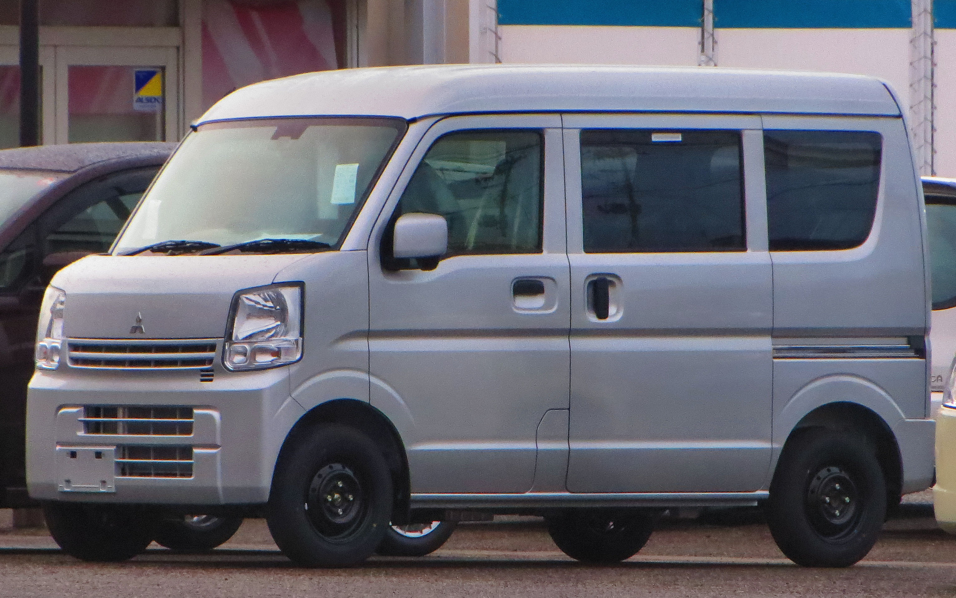 三菱 ミニキャブバン ブラボーターボ4WD